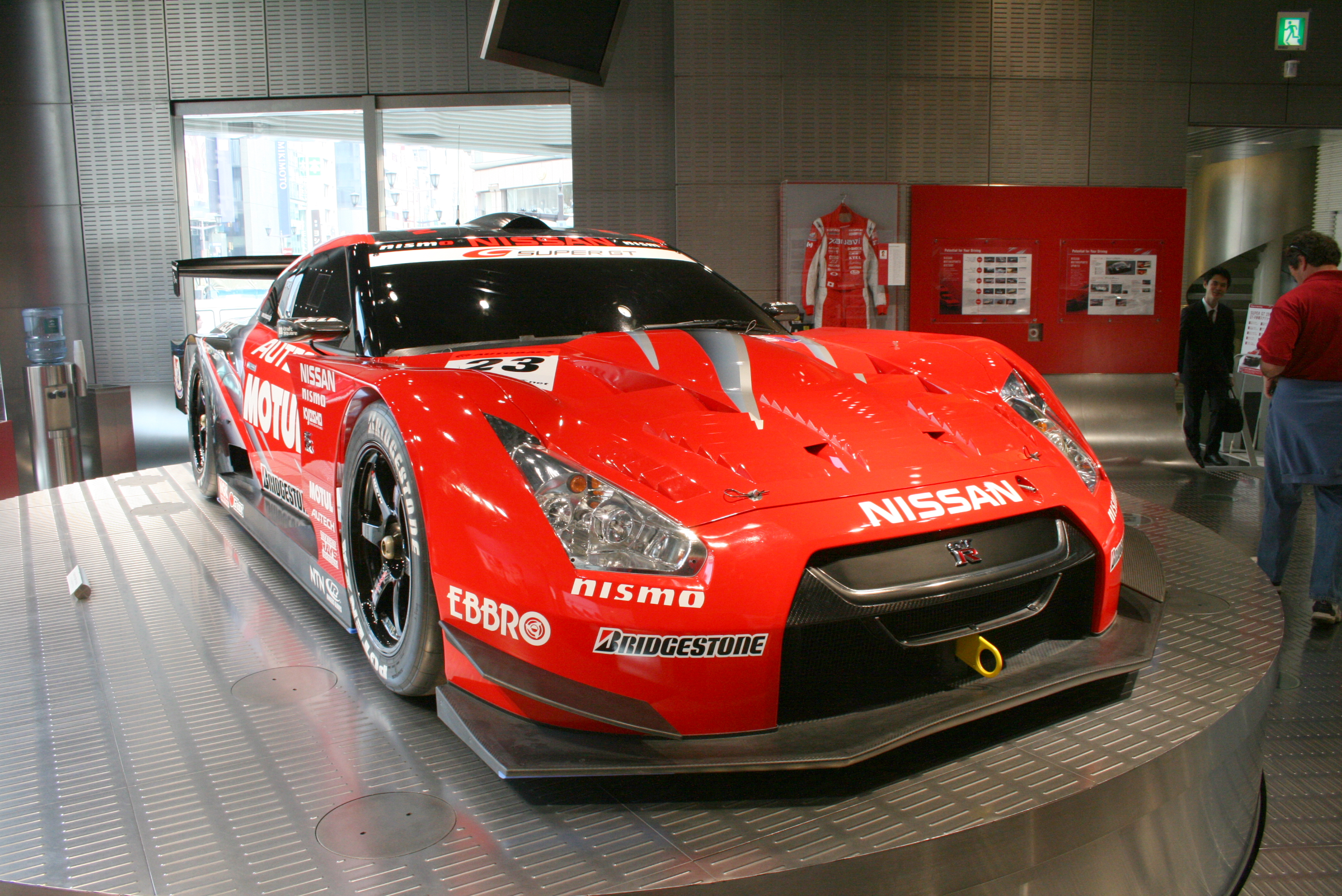 Nissan GT-R